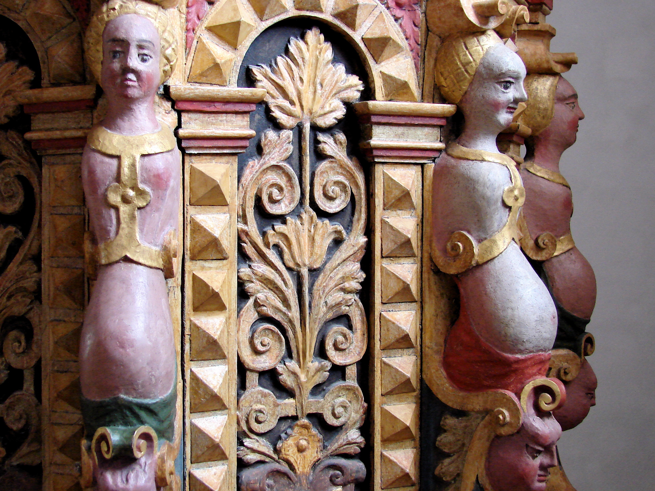 Renaissancedøbefont i træ (detalje), Vor Frue Kirke, Nyborg, Fyn